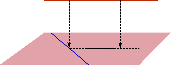 afstand tussen twee rechten